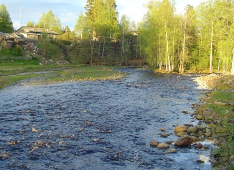 Уксунйоки